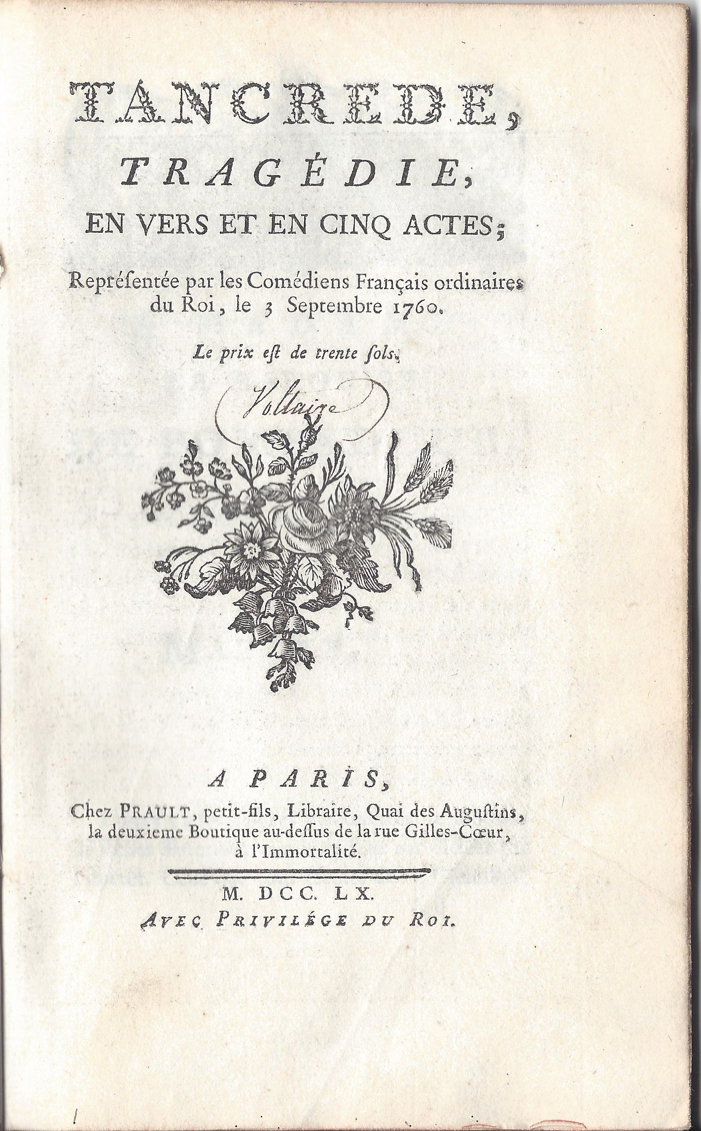 Titelblatt der Erstausgabe des Tancrède,Prault, Paris 1760. Scan eines eigenen Buchtitels.